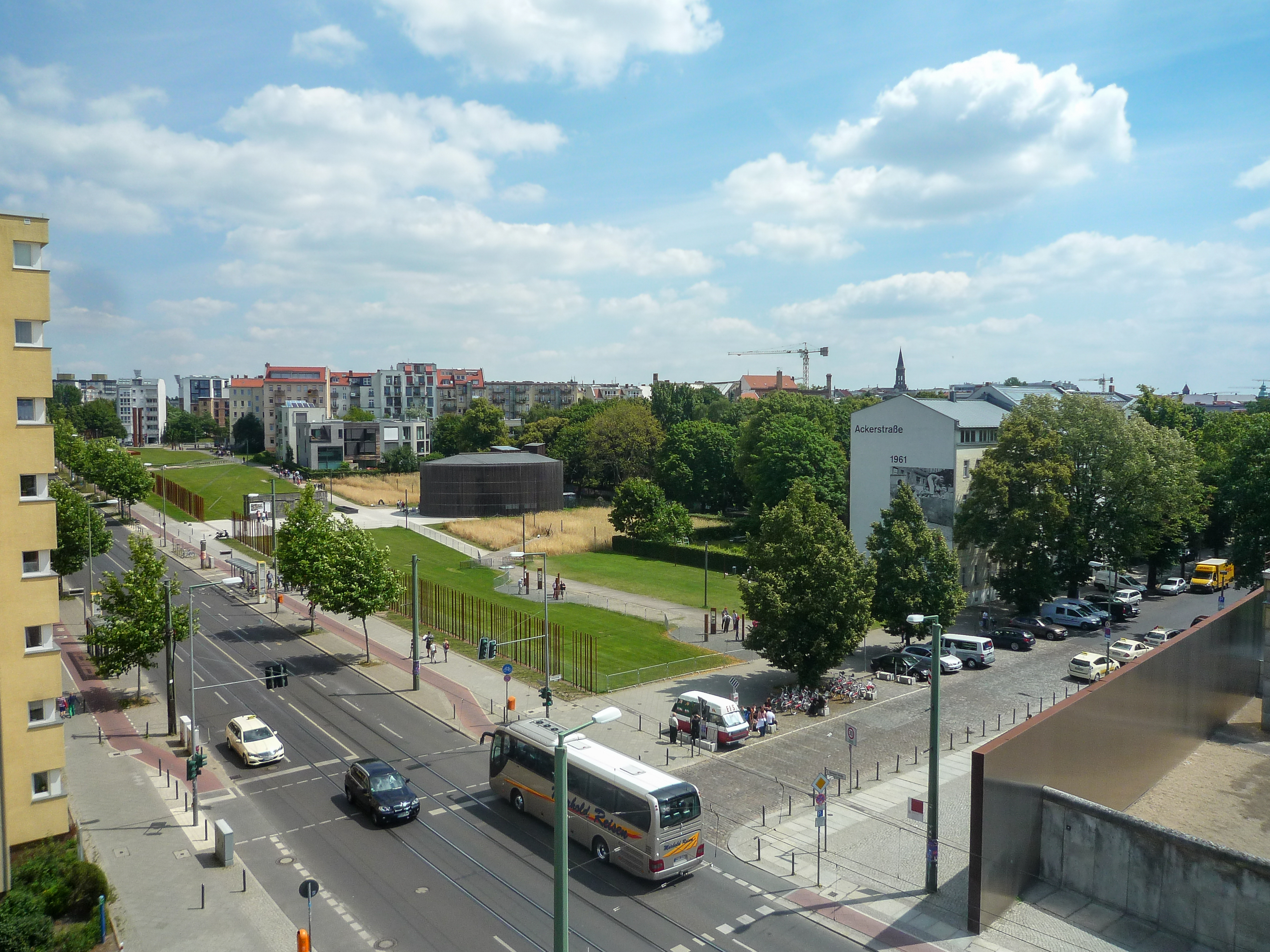 Blick vom Dokumentationszentrum auf das Gedenkstättenareal an der Bernauer Straße, Berlin.